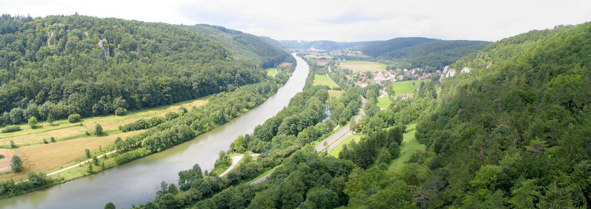 Altmuehltal Bavaria - Picture from Burg Prunn. Im Bild links das Naturschutzgebiet und Naturwaldreservat Klamm und Kastlhäng, rechts das Naturschutzgebiet um Schloß Prunn.